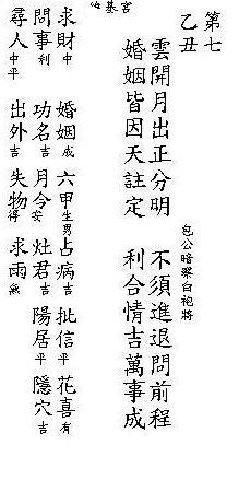 chinese 籤詩 籤詩 自製